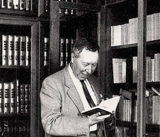 Piero Treves (1911 - 1992)